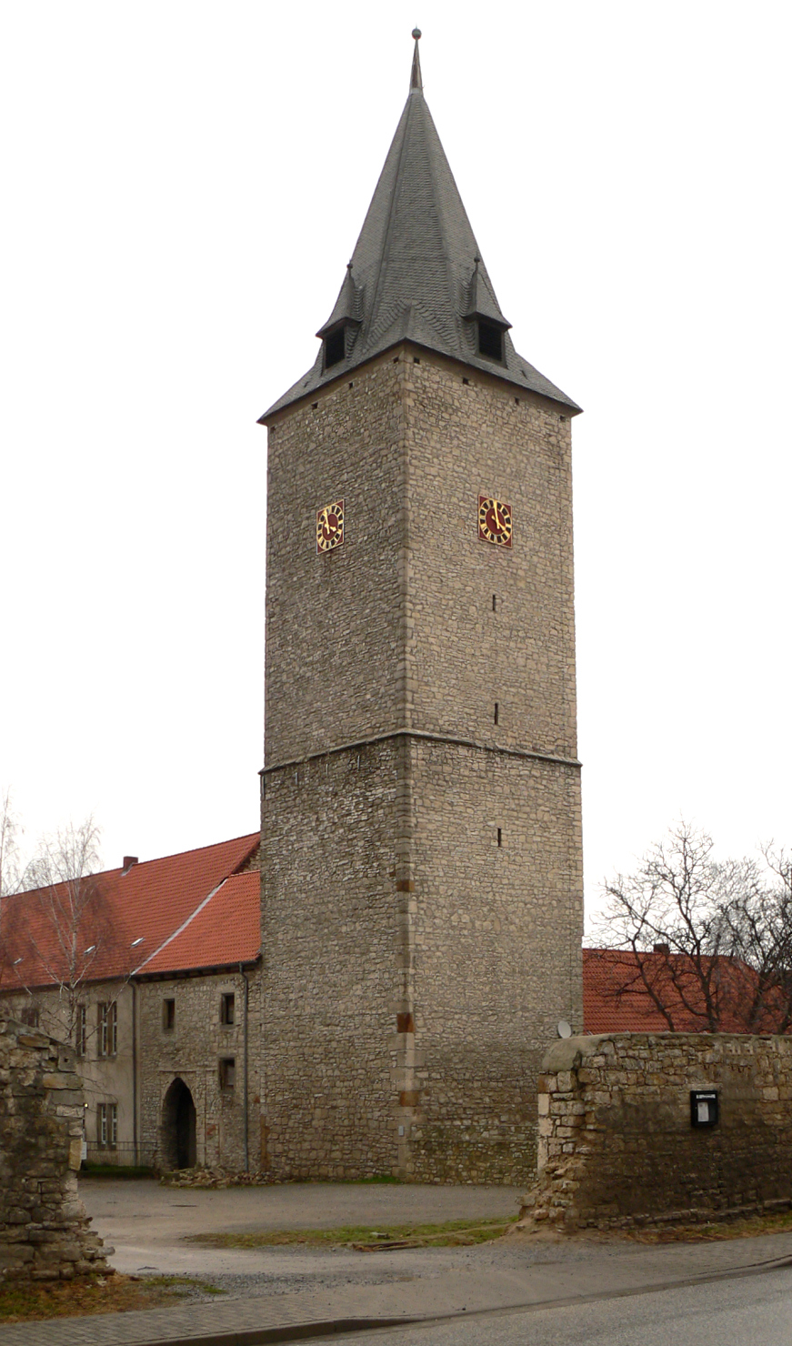 Schloss Hessen, Bergfried der Unterburg